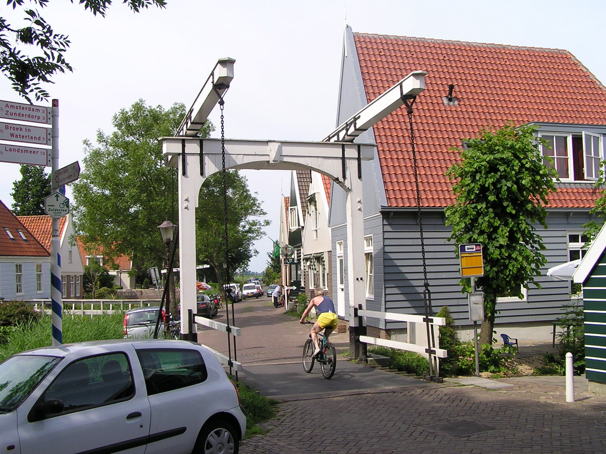 Downtown Ransdorp, juli 2005.